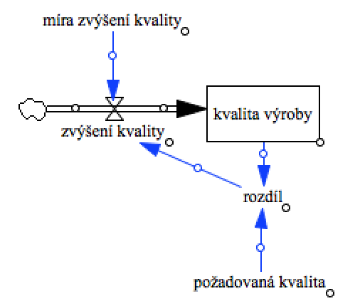 SFD, cilovy stav ve Vensim